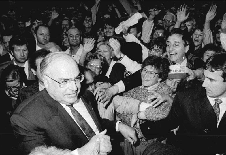 Dresden, CDU-Wahlveranstaltung, Helmut Kohl ADN Matthias Hiekel 21 16.9.90 Dresden: Eine Wahlkampfveranstaltung der sächsischen CDU vereinte mehrere zehntausende Bürger an der Ruine der Frauenkirche. Herzlich begrüßten die Teilnehmer Bundeskanzler Helmut Kohl, der fast auf den Tag genau vor neun Monaten nach den Verhandlungen mit Ex-Premier Hans Modrow am gleichen Platz gesprochen hatte. Abgebildete Personen: Kohl, Helmut: Bundeskanzler, Ministerpräsident von Rheinland-Pfalz, CDU, Bundesrepublik Deutschland (GND 118564595)